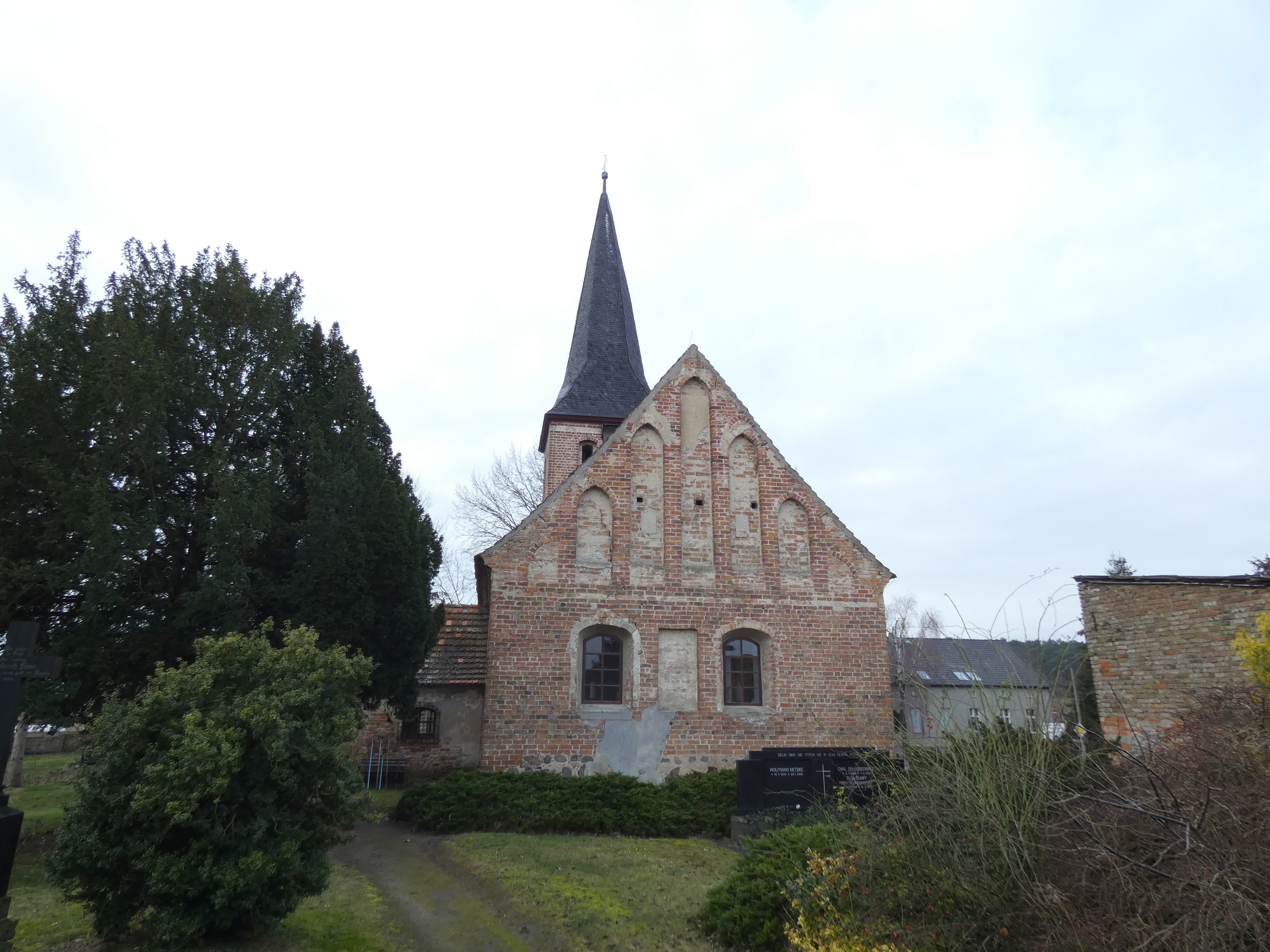 Dorfkirche Zachow (Ketzin), Blendgiebel